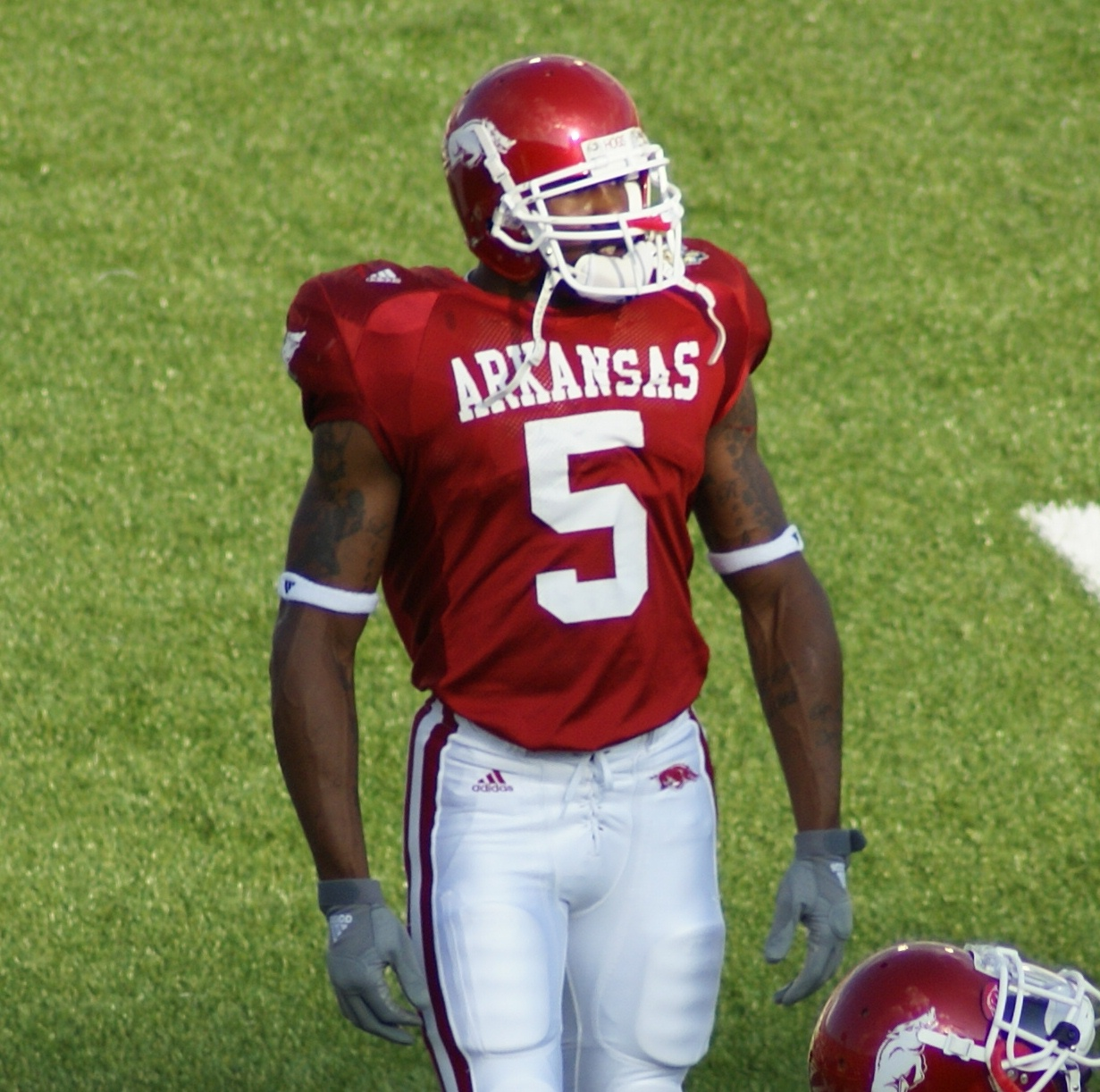 Darren McFadden, tailback for the Arkansas Razorbacks